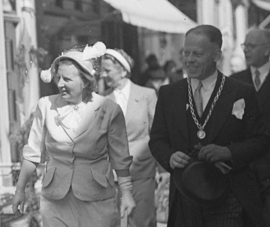 Collectie / Archief : Fotocollectie Anefo Reportage / Serie : [ onbekend ] Beschrijving : Koningin Juliana bezoekt Utrecht (door Wijk bij Duurstede Datum : 9 juni 1950 Locatie : Utrecht Trefwoorden : bezoeken Persoonsnaam : Juliana (koningin Nederland), Juliana, koningin Fotograaf : Noske, J.D. / Anefo Auteursrechthebbende : Nationaal Archief Materiaalsoort : Glasnegatief Nummer archiefinventaris : bekijk toegang 2.24.01.09 Bestanddeelnummer : 904-0083